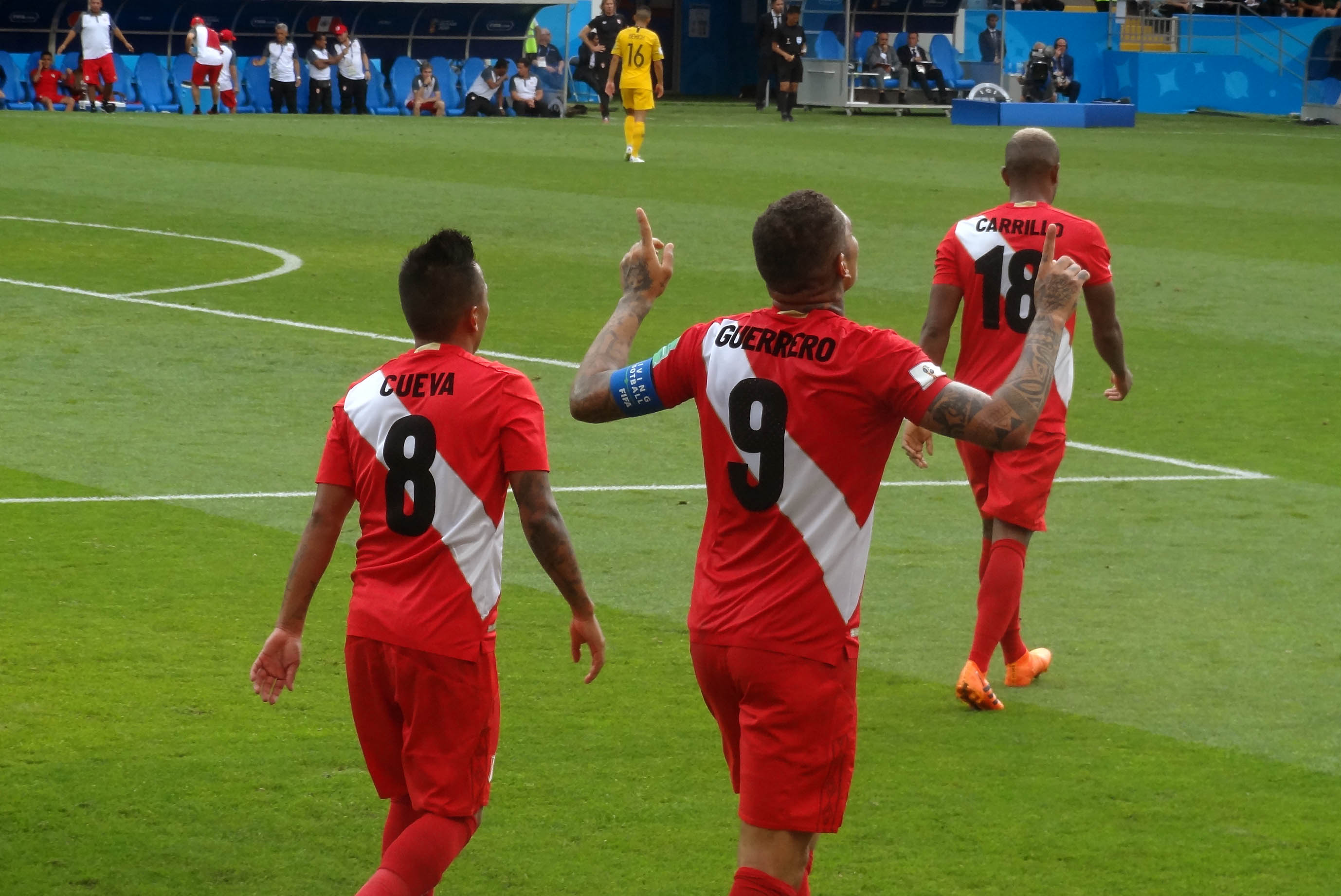 26 июня 2018 года сборная Перу выиграла у сборной Австралии со счётом 2:0, на ЧМ-2018 на стадионе Фишт.